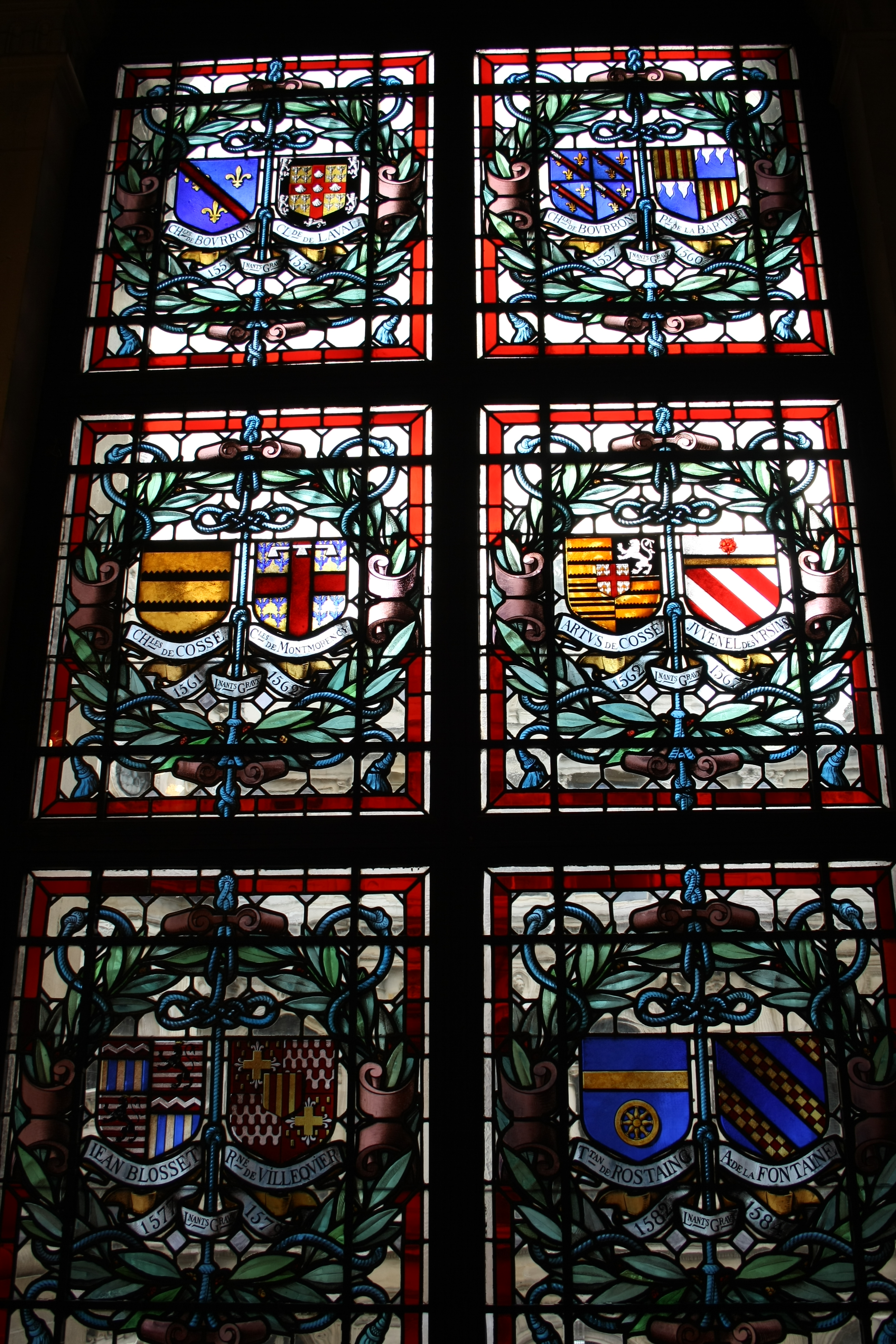 Bleiglasfenster im Rathaus von Paris (4. Arrondissement), "galerie du conseil", Darstellung: Wappen der Prévôt des marchands de Paris